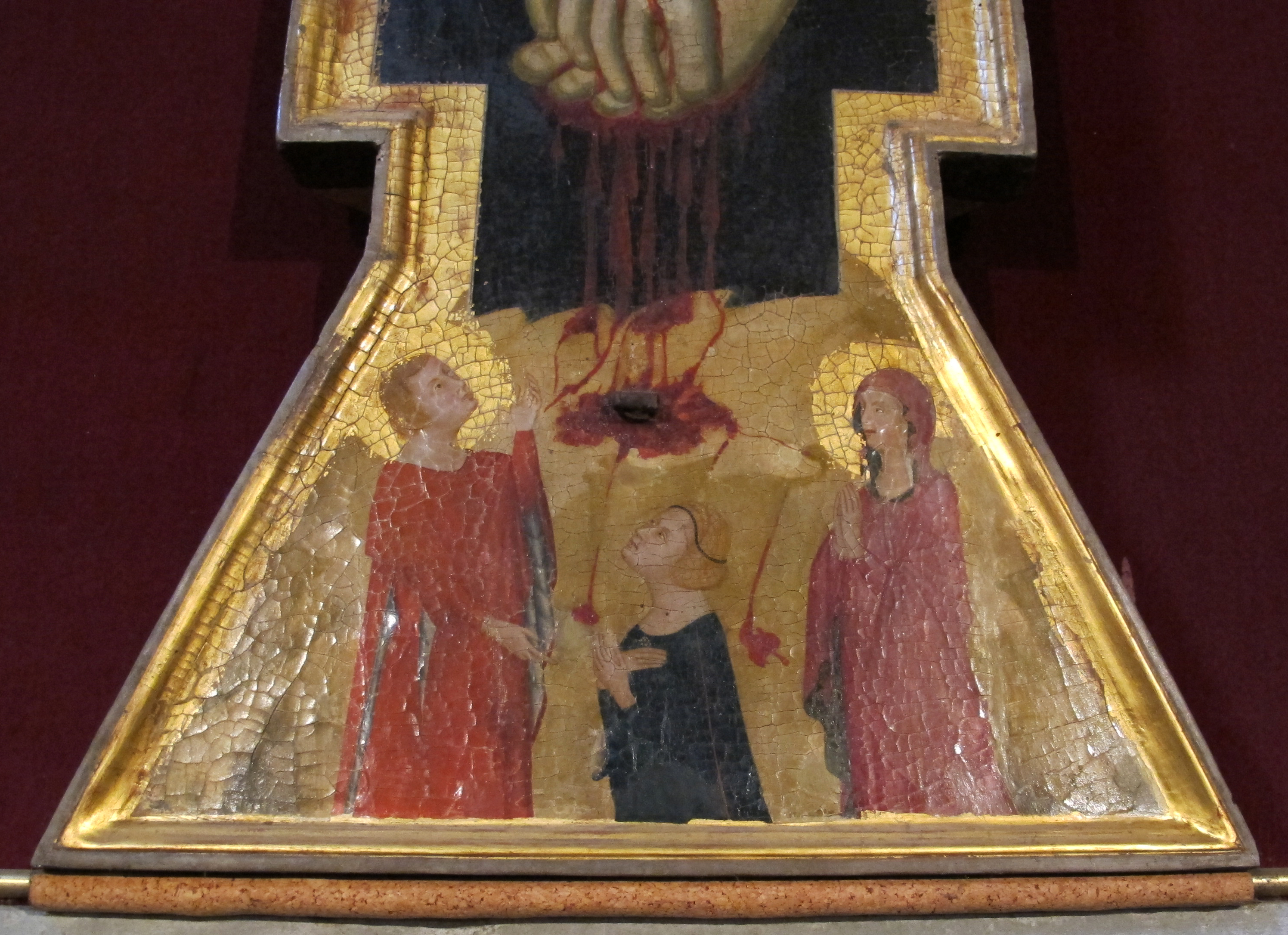 Ruballa, Bagno a Ripoli